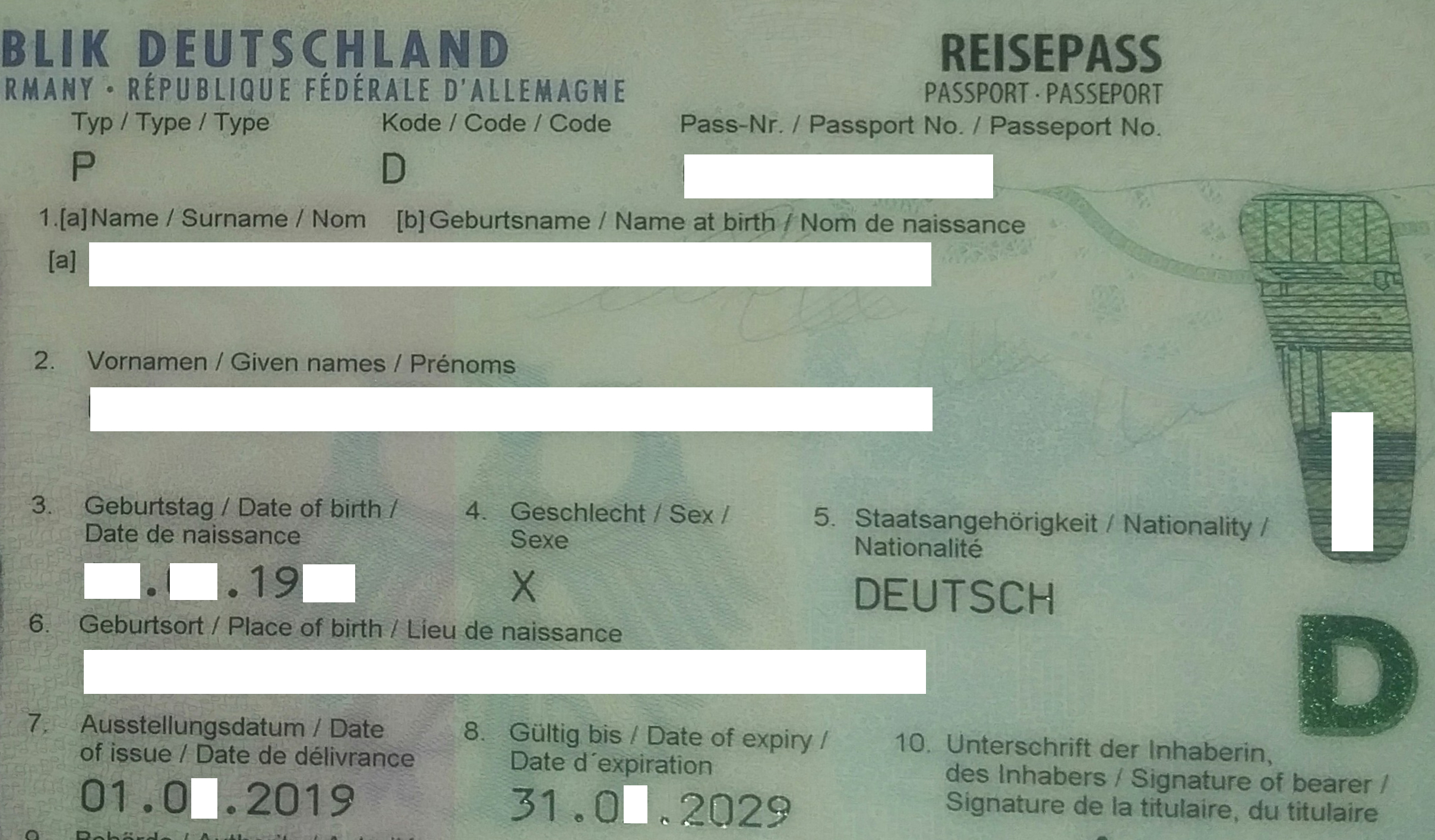 Reisepass, drittes Geschlecht